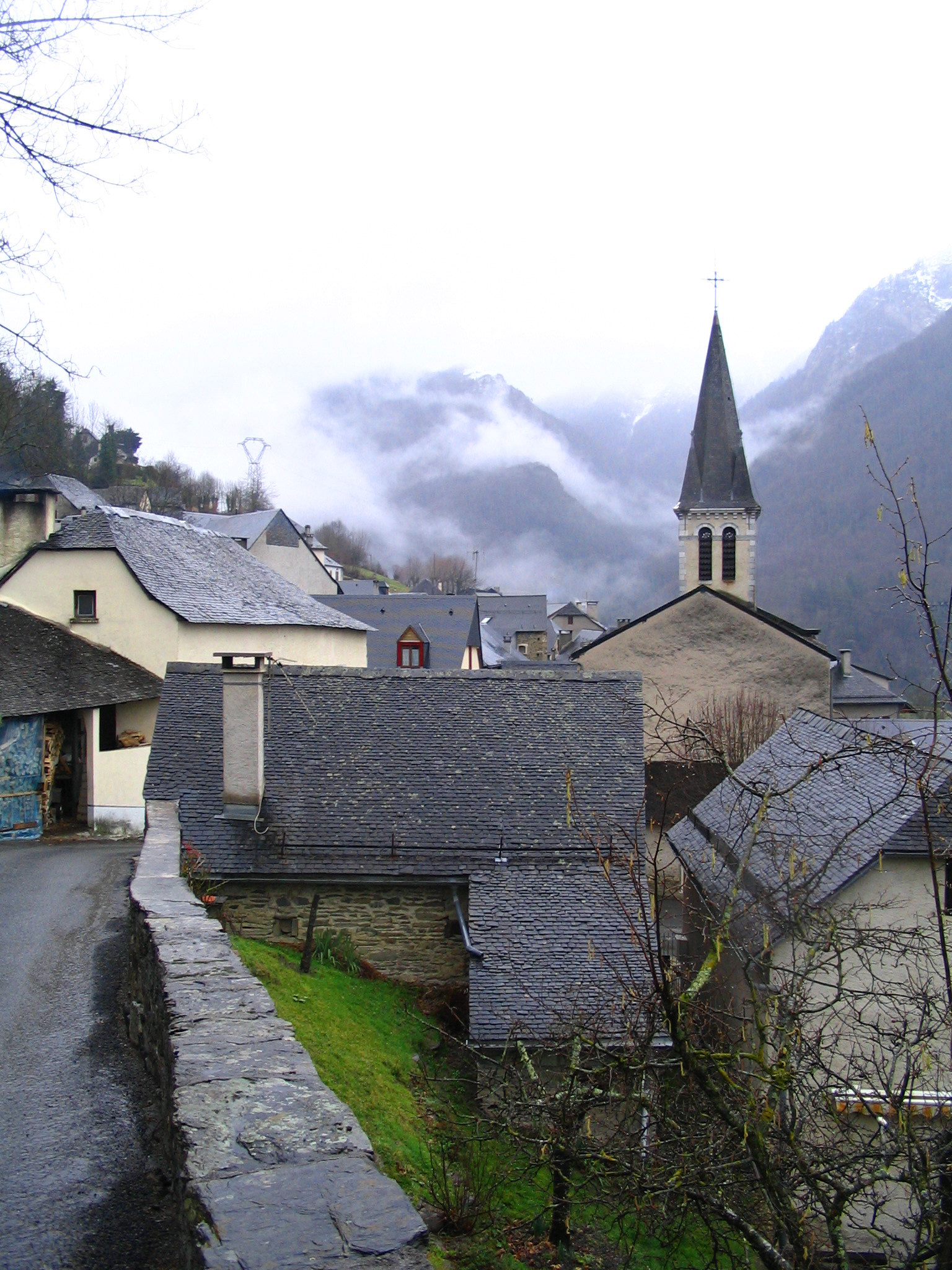 Village d'Aas - vue de la route de Bagès - Pyrénées Atlantiques - France uteur: P.Charpiat - 2007